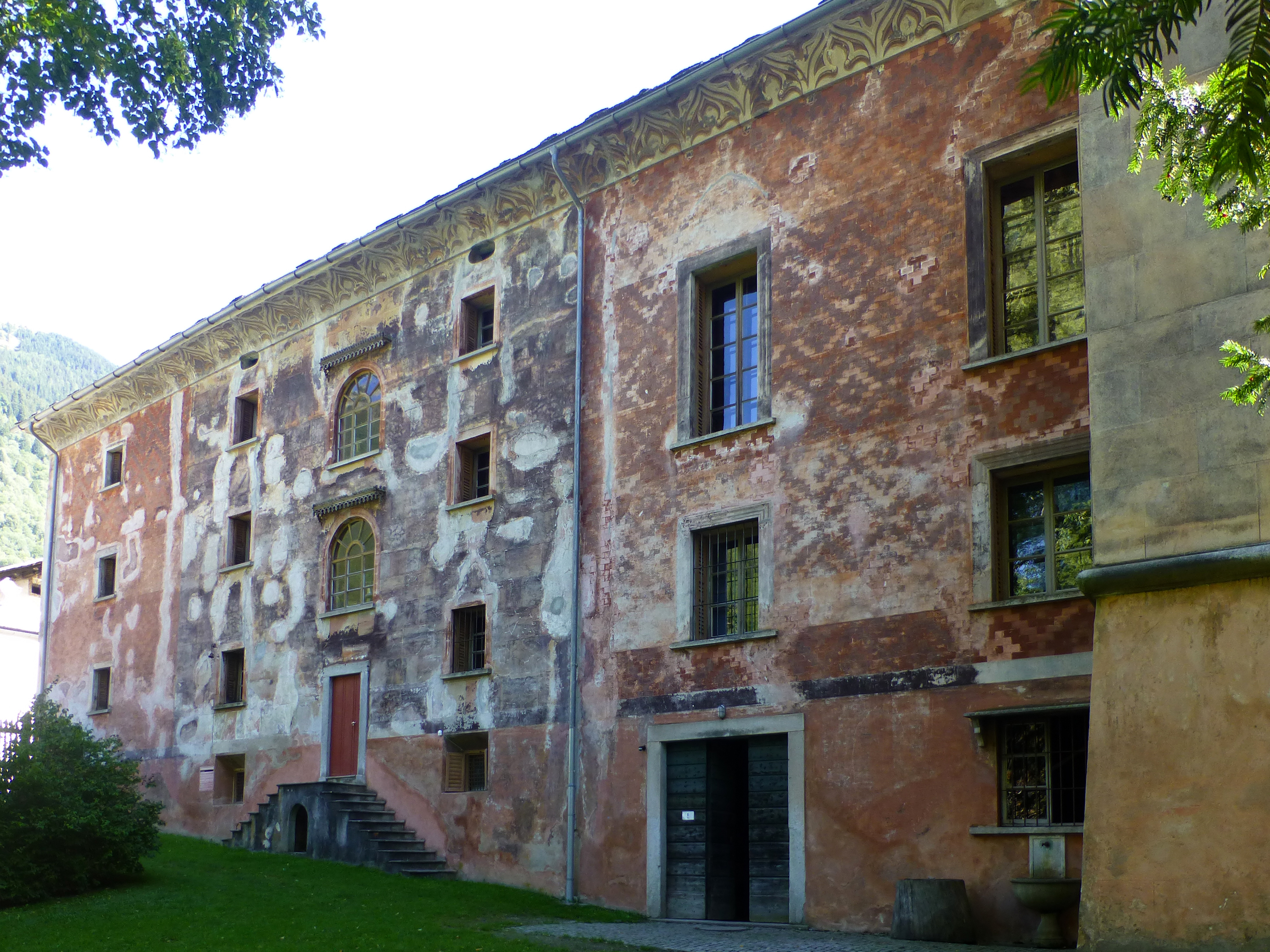 Palazzo Castelmur; Westfassade